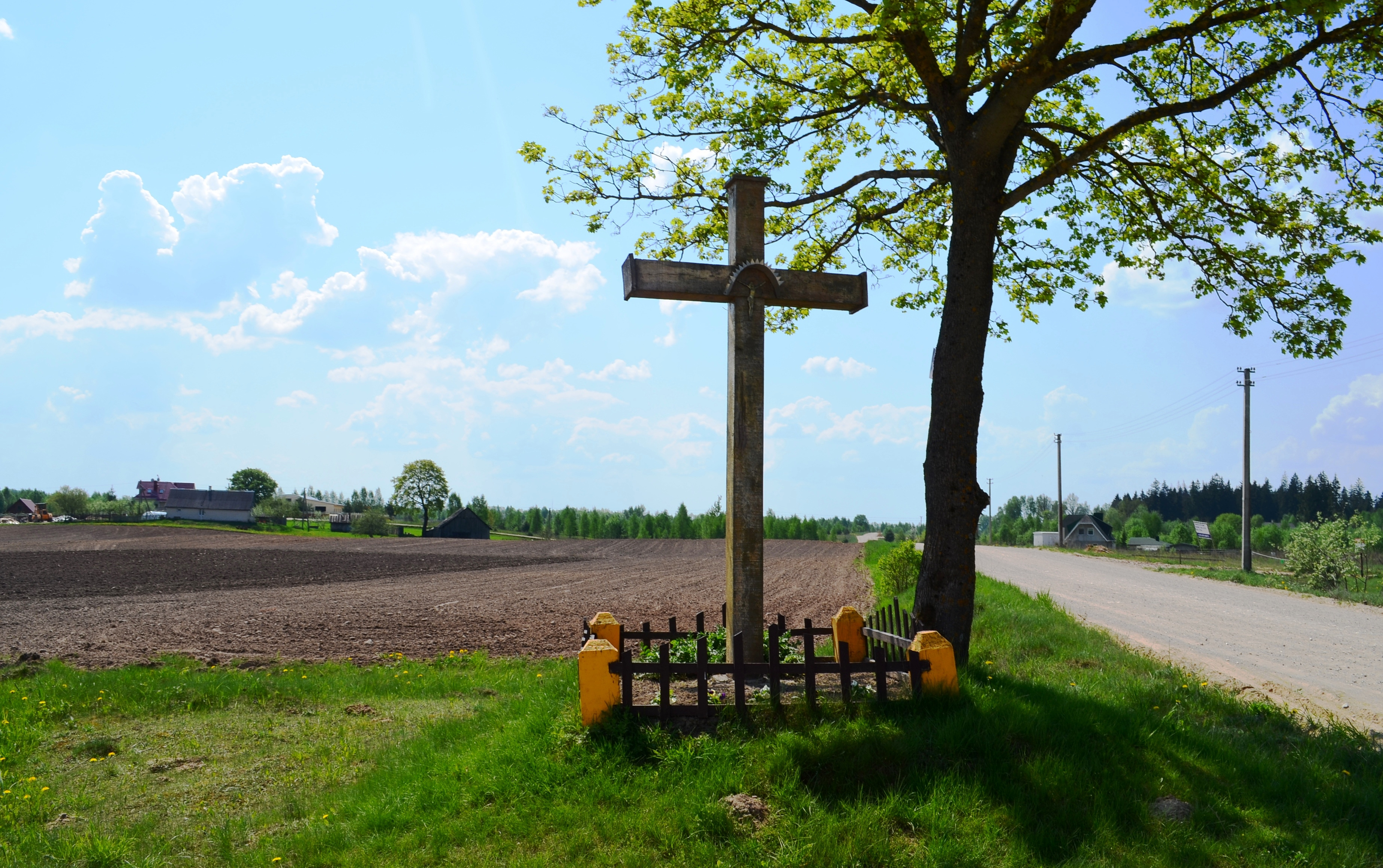 Kryžius, Lindiniškės, Vilniaus raj.